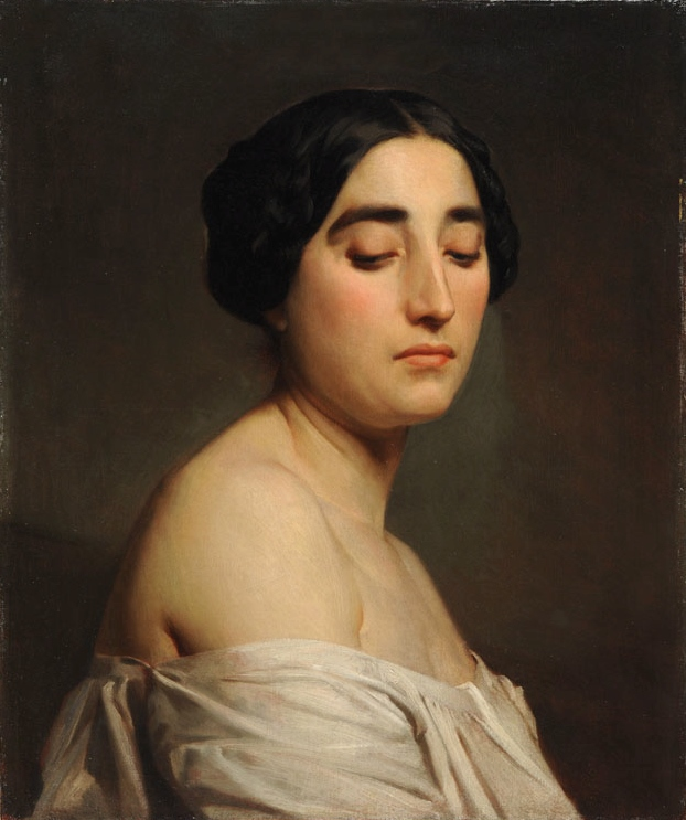 William Bouguereau, Le Dédain, ENSBA